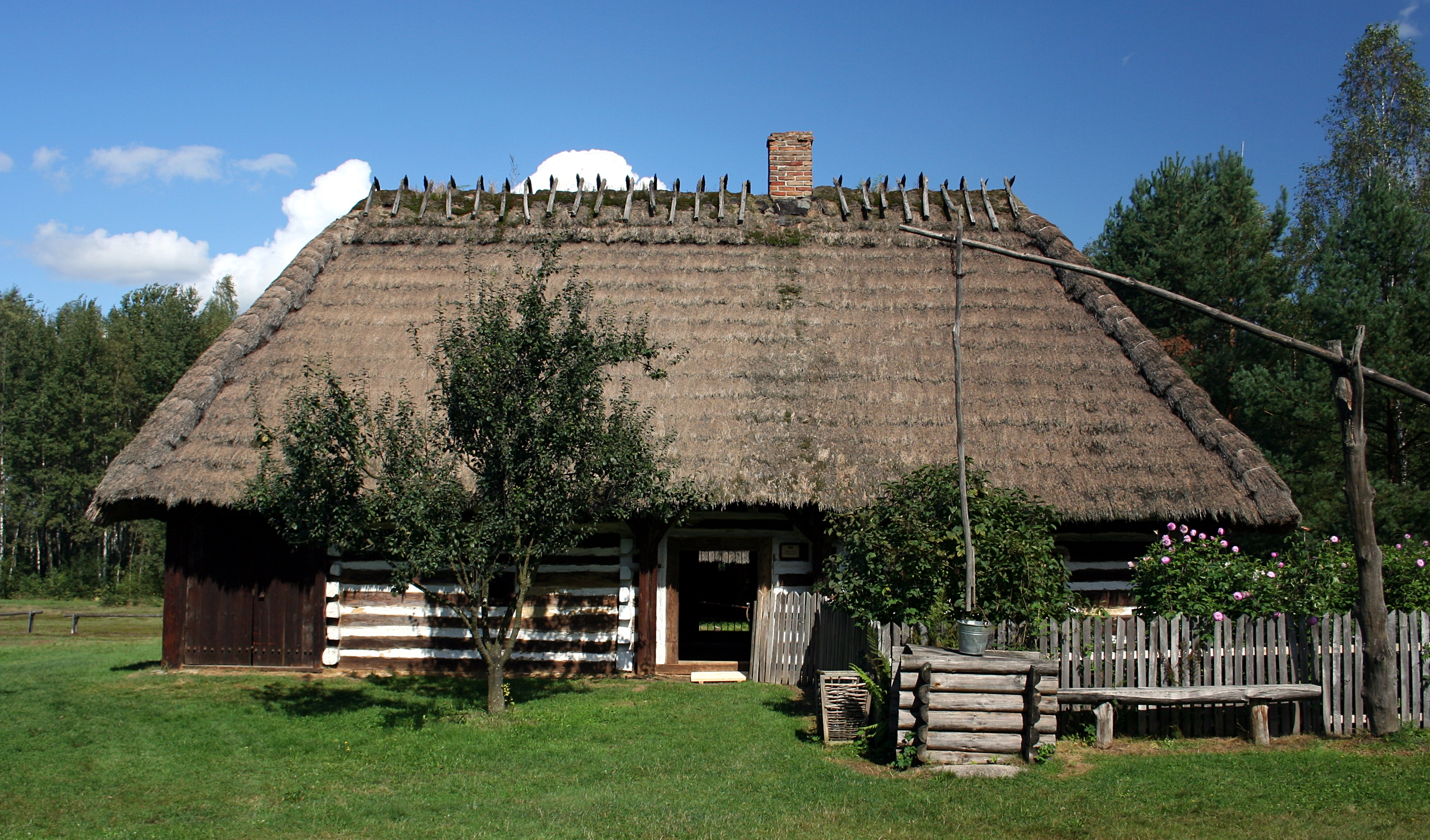 Muzeum Kultury Ludowej w Kolbuszowej. Chałupa z Markowej